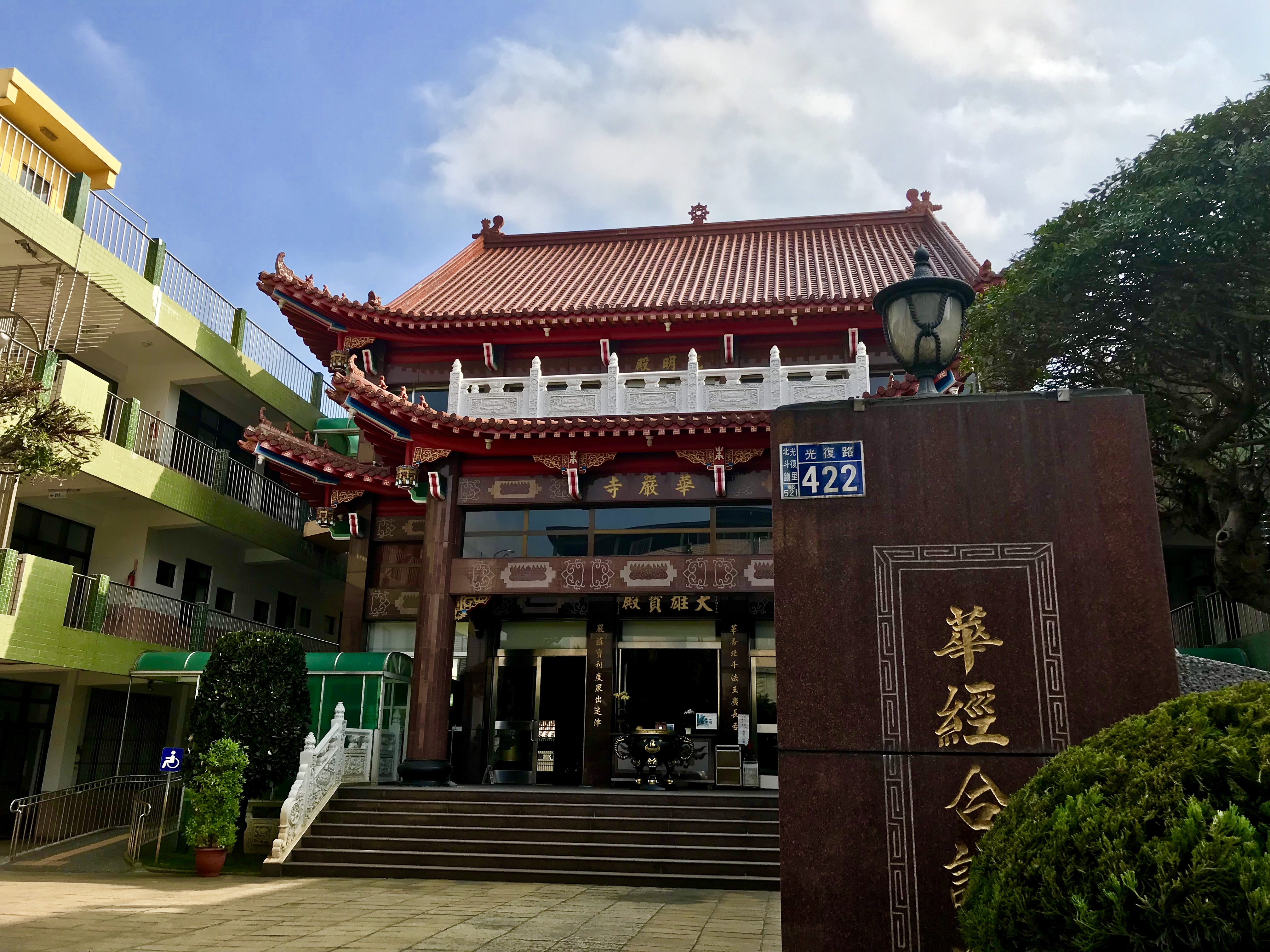 北斗華嚴寺正殿與門牌